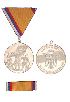 Srpski (latinica): Medalja zasluga za narod